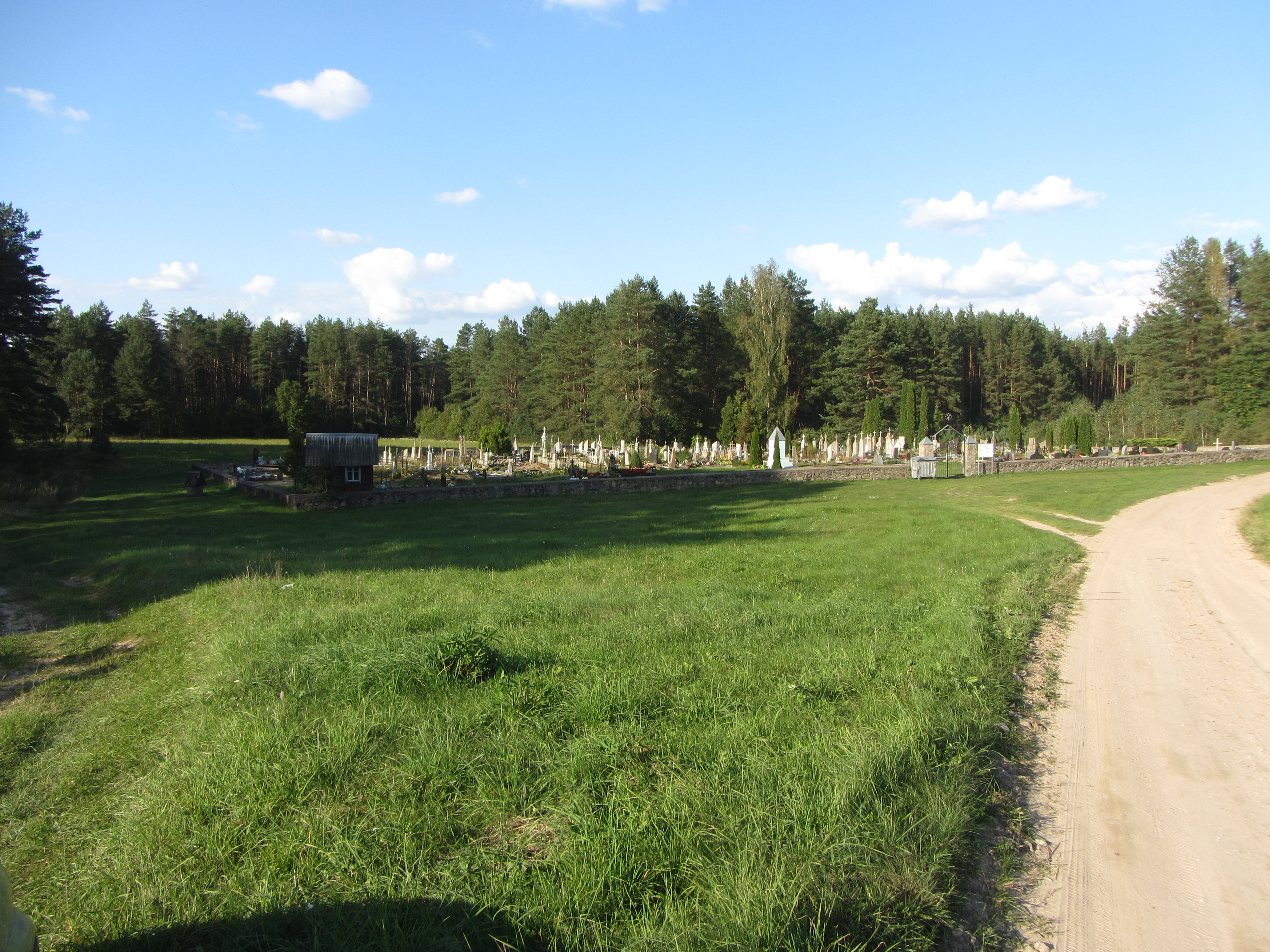 Kalesninkų sen., Lithuania